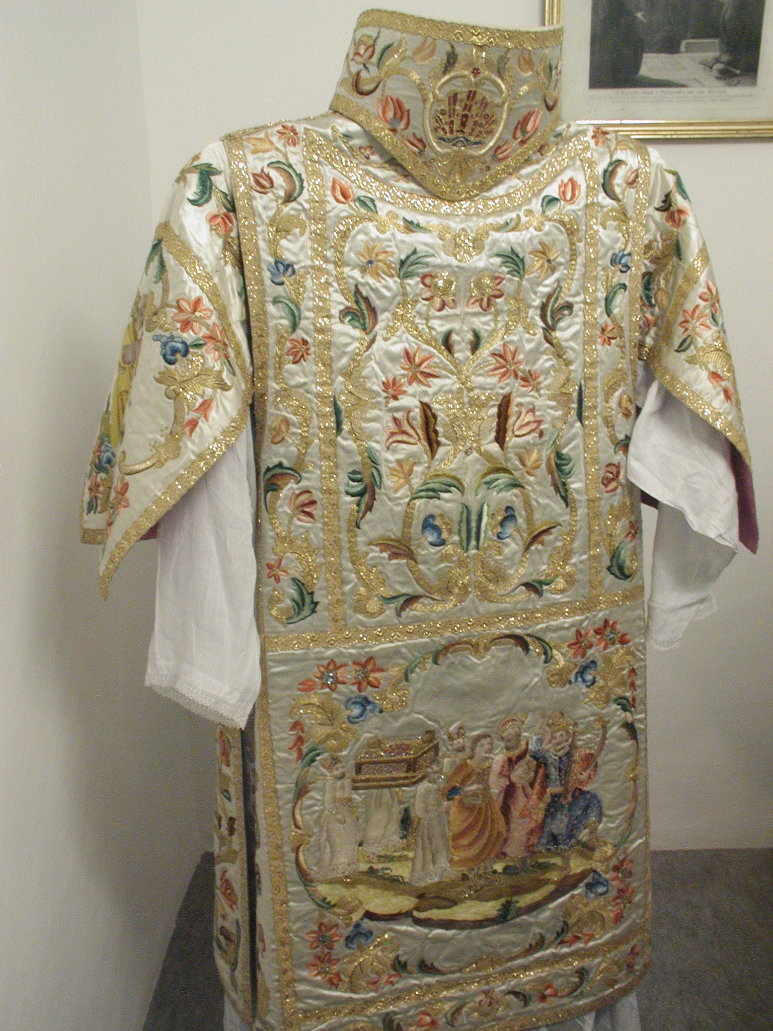 eigen gebruik v foto. spanse collectie